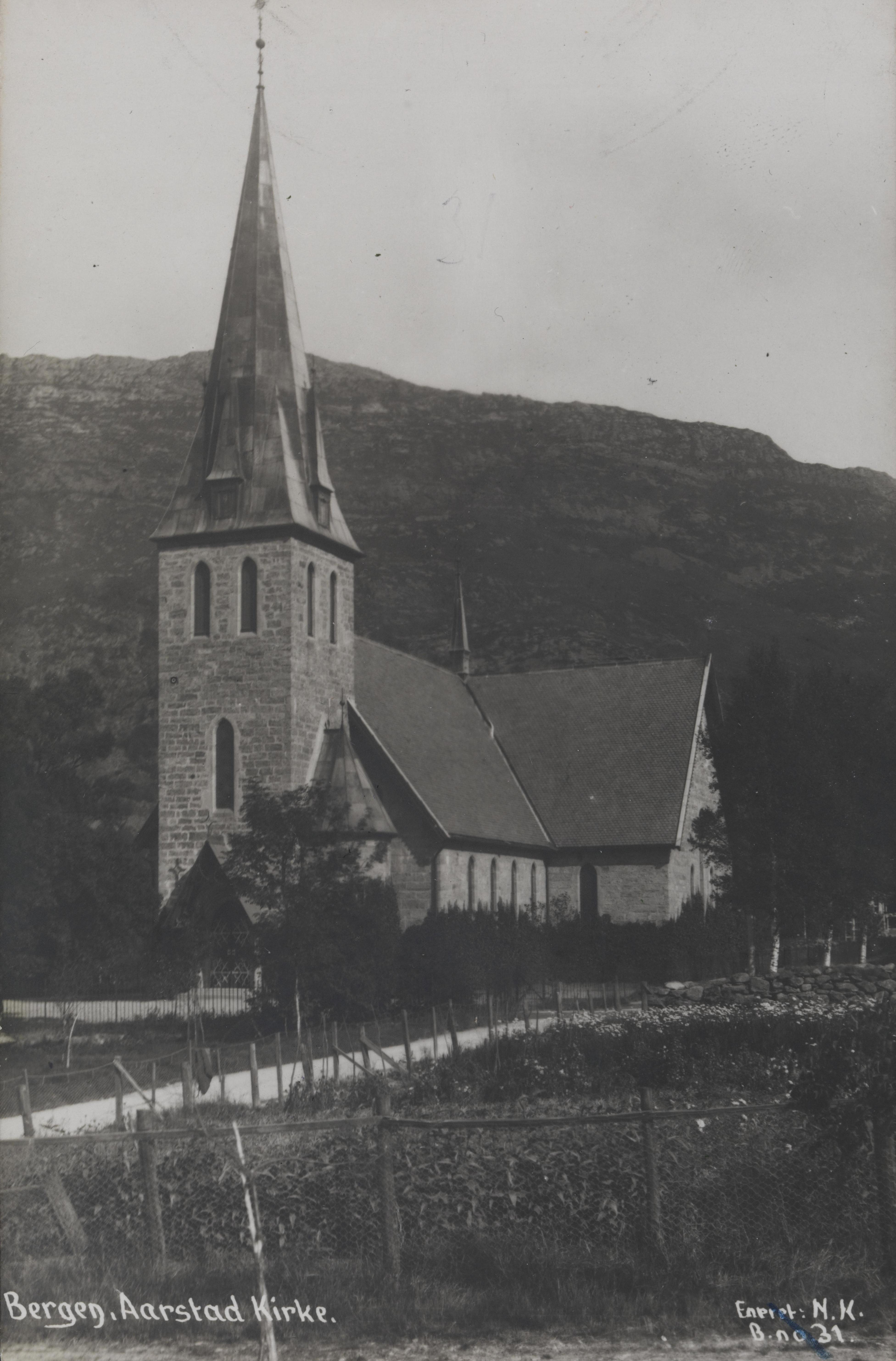 Bildet er hentet fra Nasjonalbibliotekets bildesamling Bergen, Hordaland